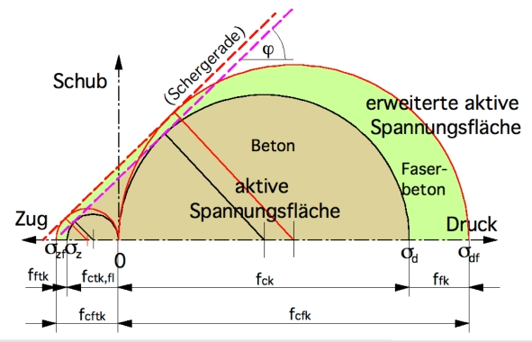 erweiterte zulässige Spannungsflächen